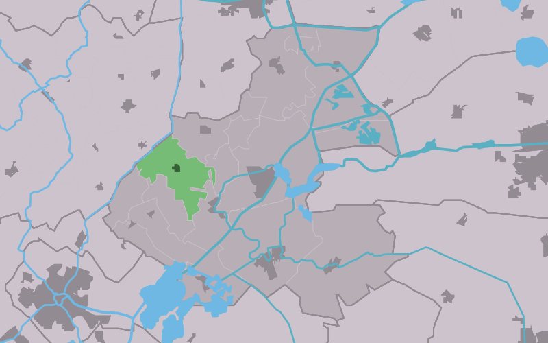 Kaartsje fan himrik fan Raerd